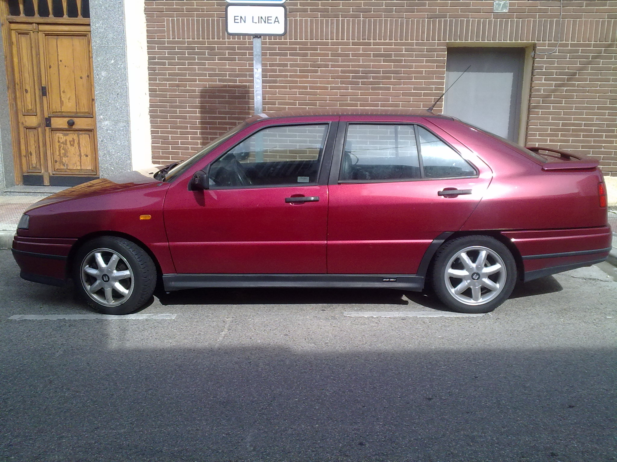 SEAT Toledo 2.0i 16v visto en la calle